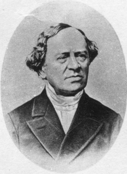 Karl Grüneisen (1802-1878), Porträtfoto